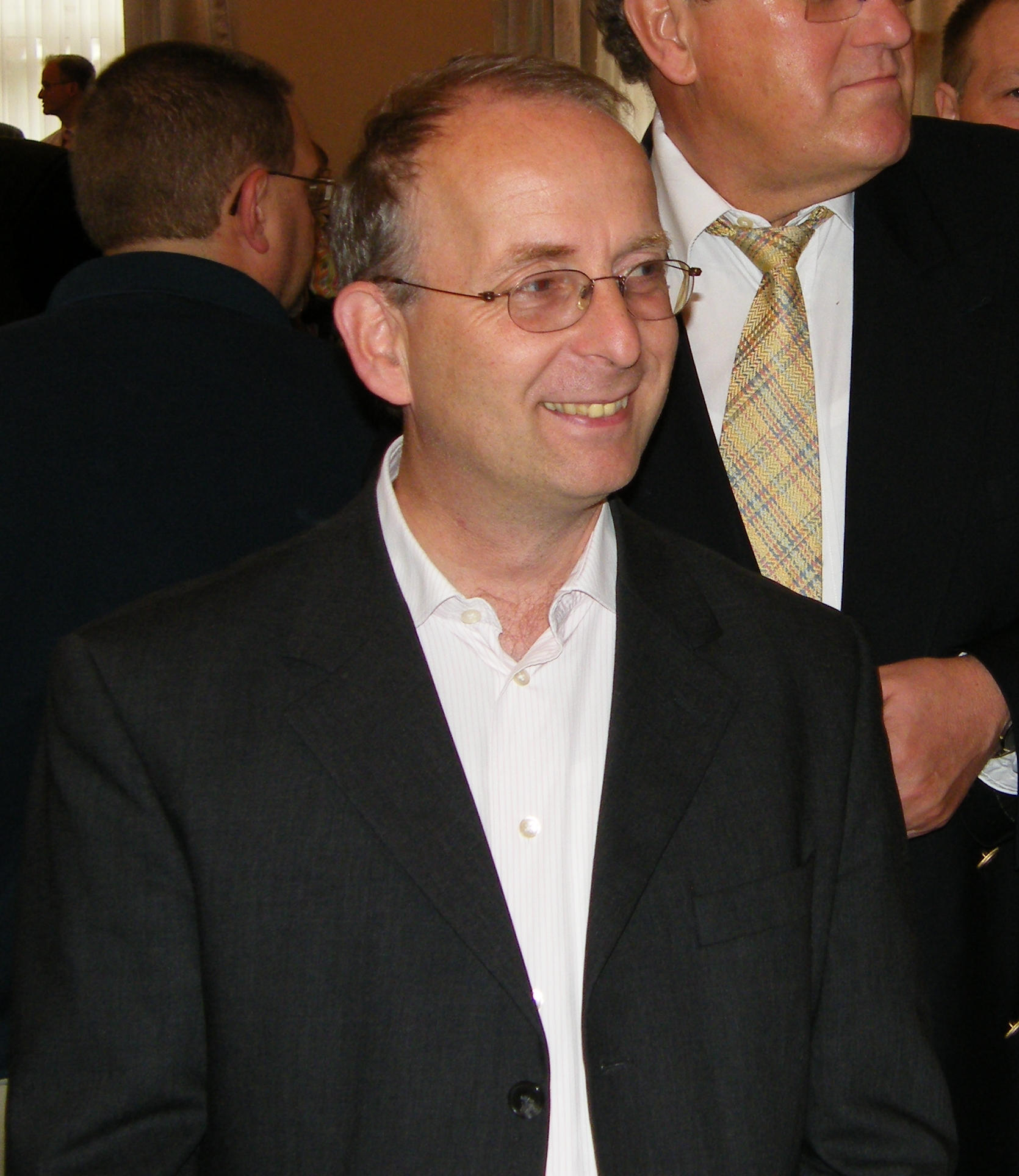 Uwe Klett bei der Deutschen Schnellschach-Einzelmeisterschaft in Fredersdorf-Vogelsdorf